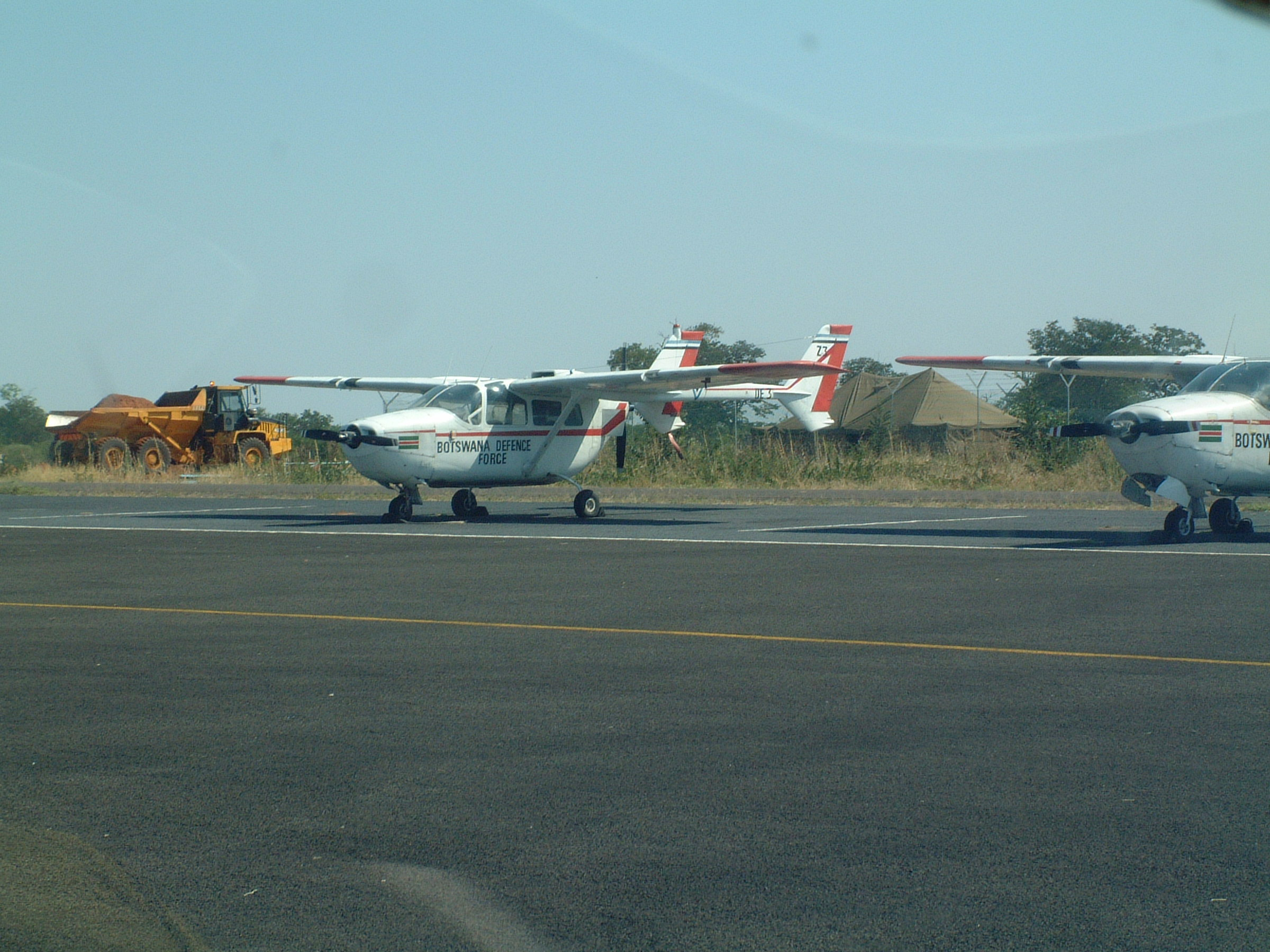 Flugplatz Kasane